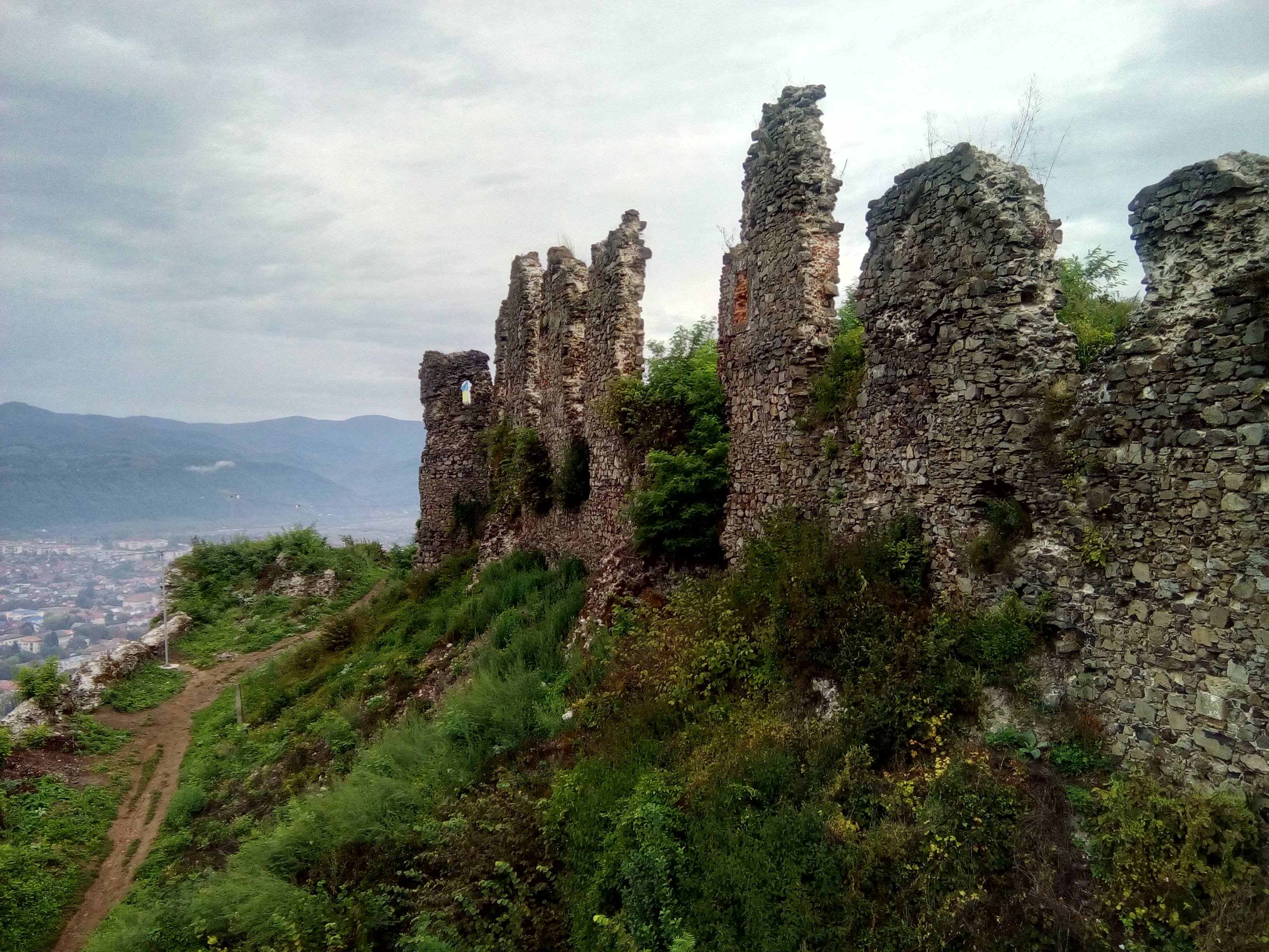 Руїни замку (мур.), Хуст, вул. Замкова